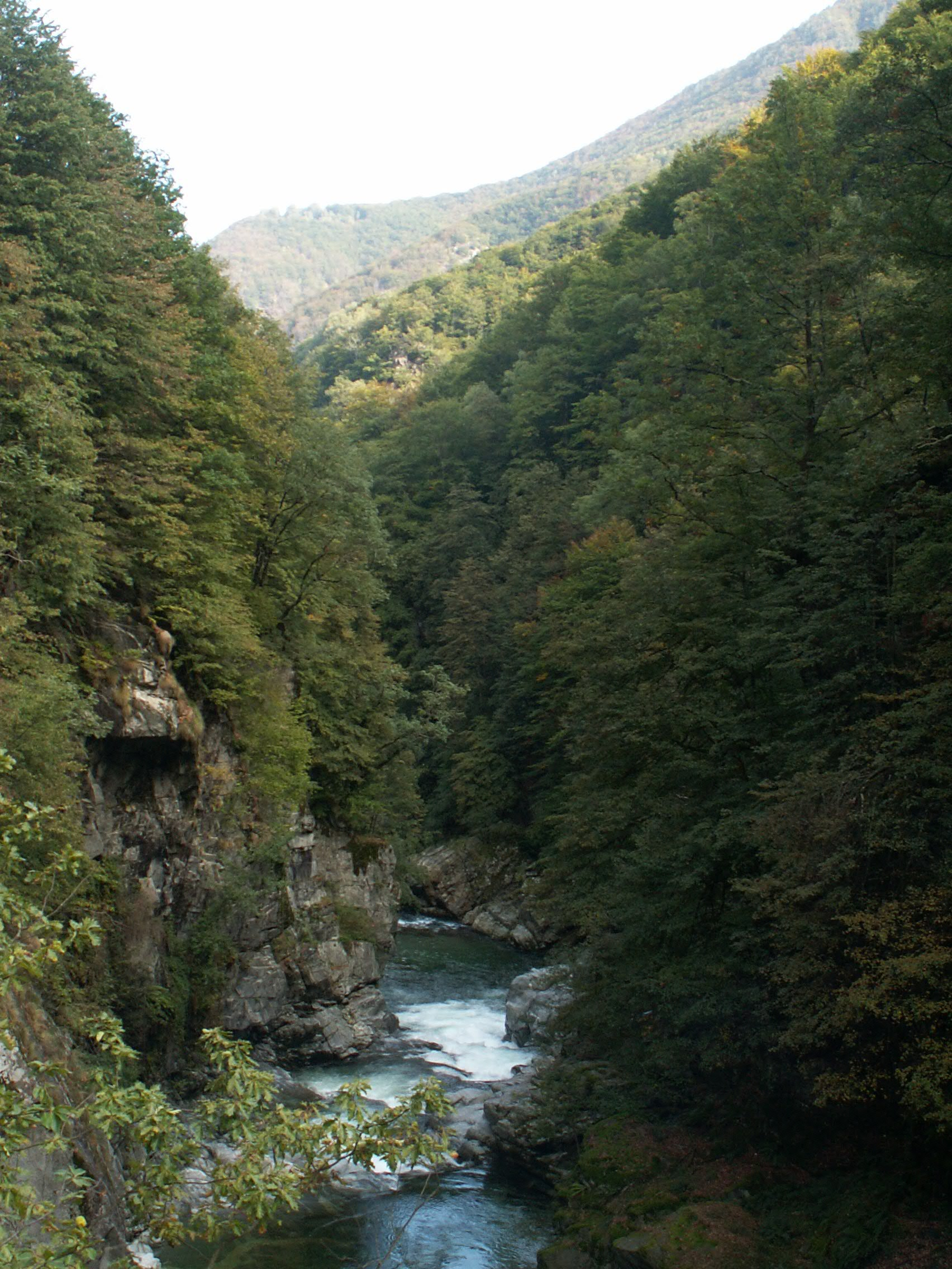 Il fiume Isorno